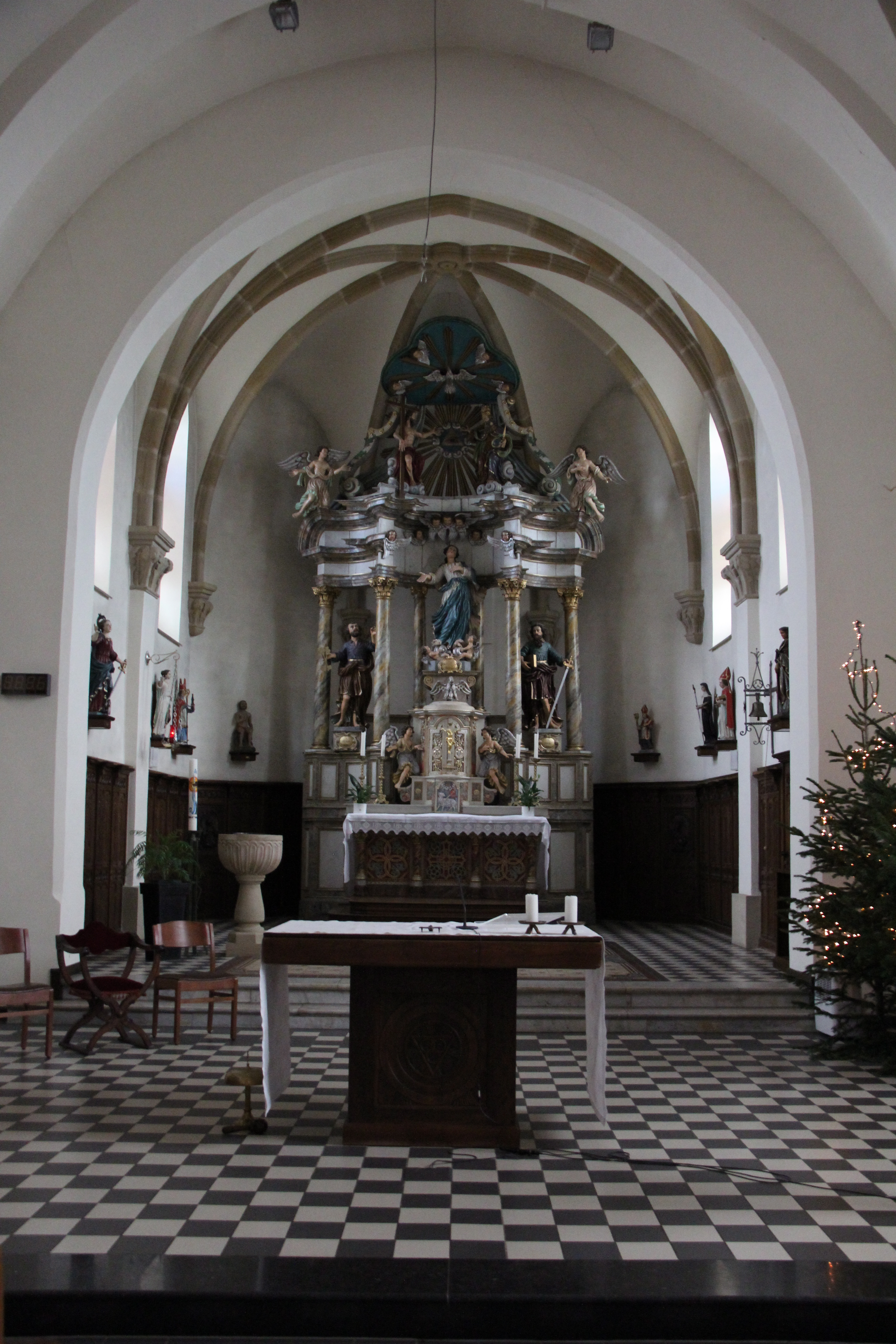 Haaptaltor an der Parkierch vu Biekerech.